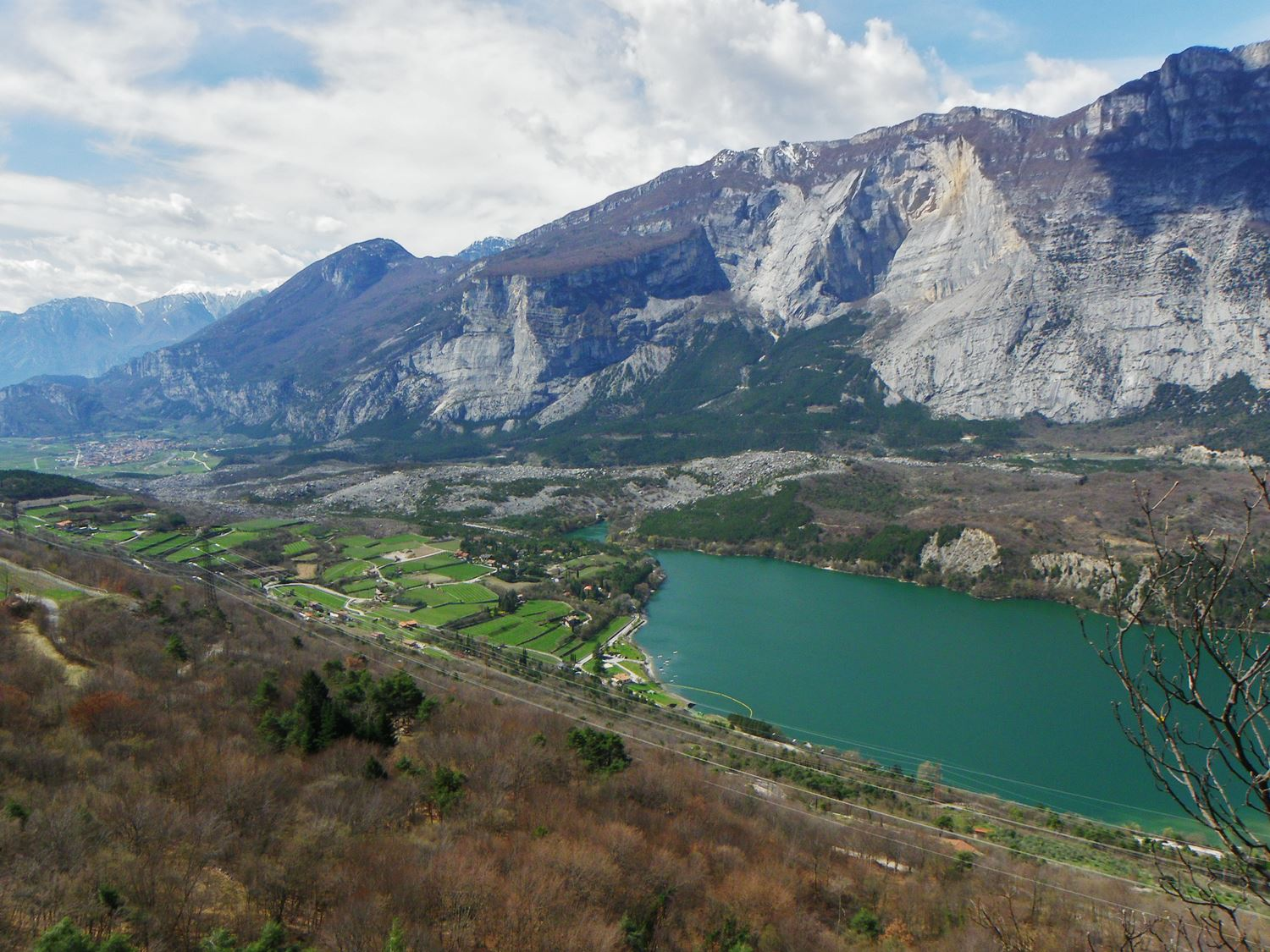 Le Marocche di Dro (TN)